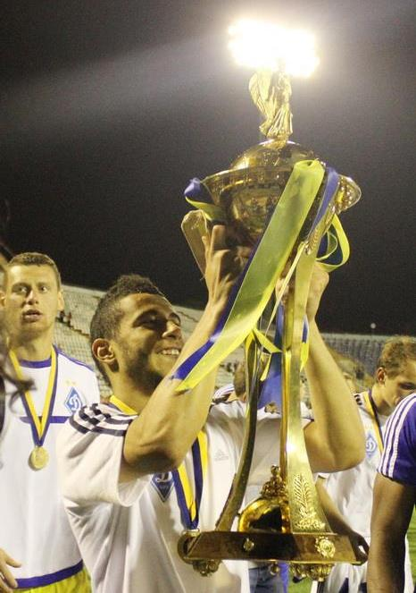 Юнес Беланда з Кубком України 2014 року